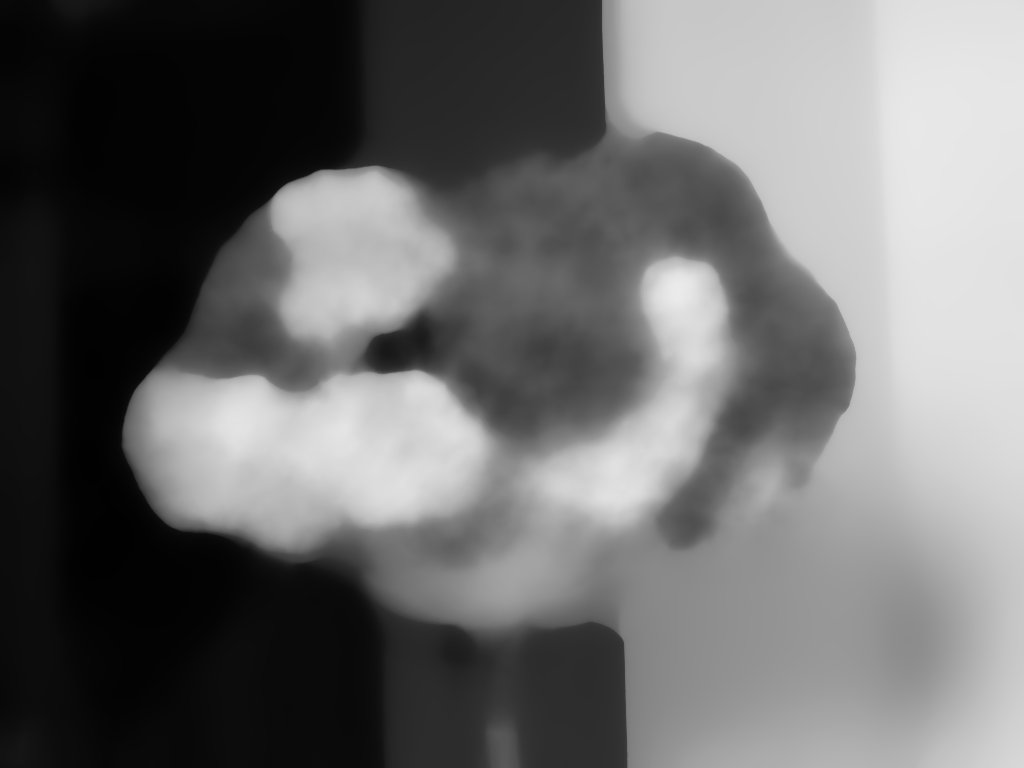 Tamanho da máscara - 35x